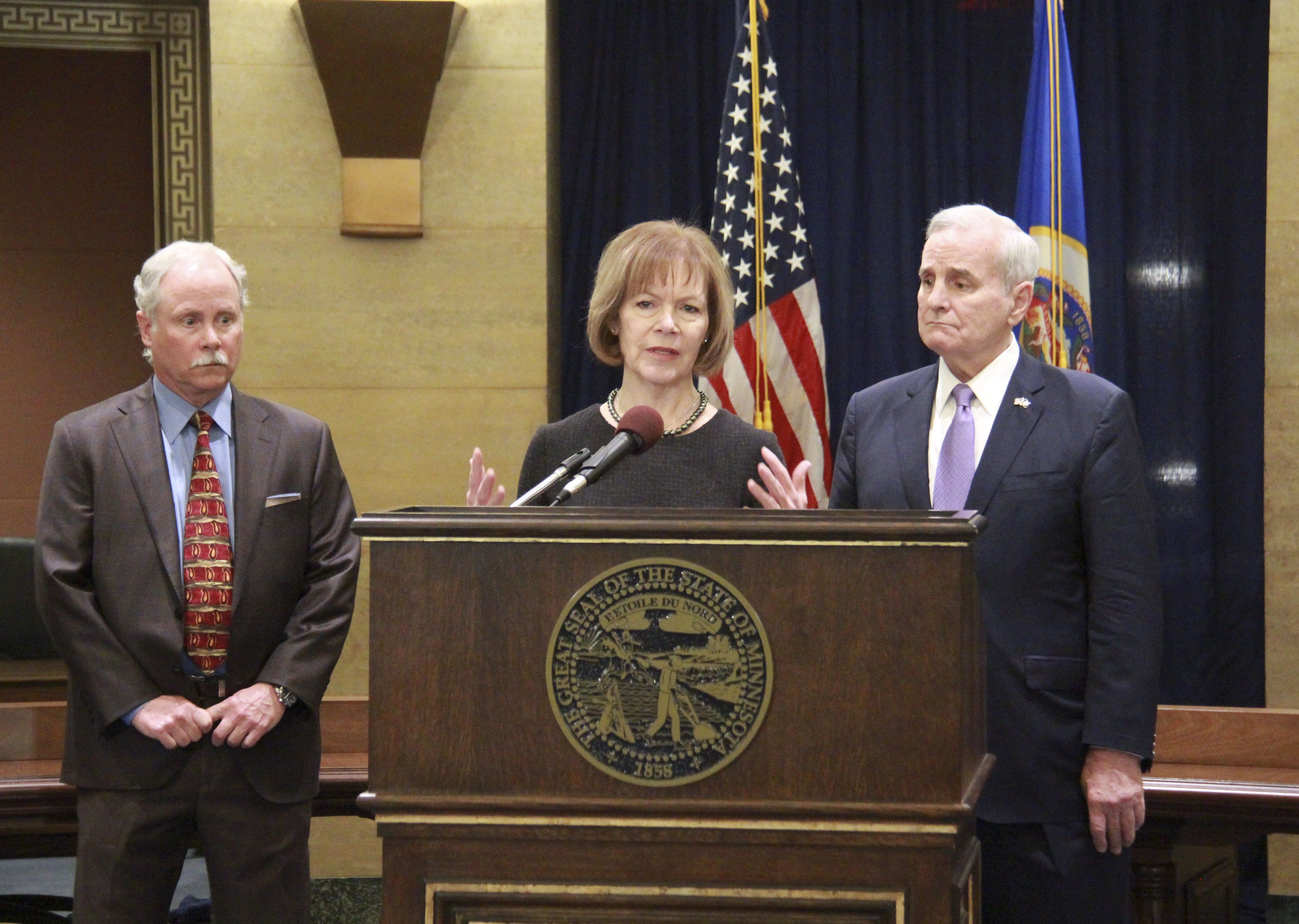 LGS_Senate_05